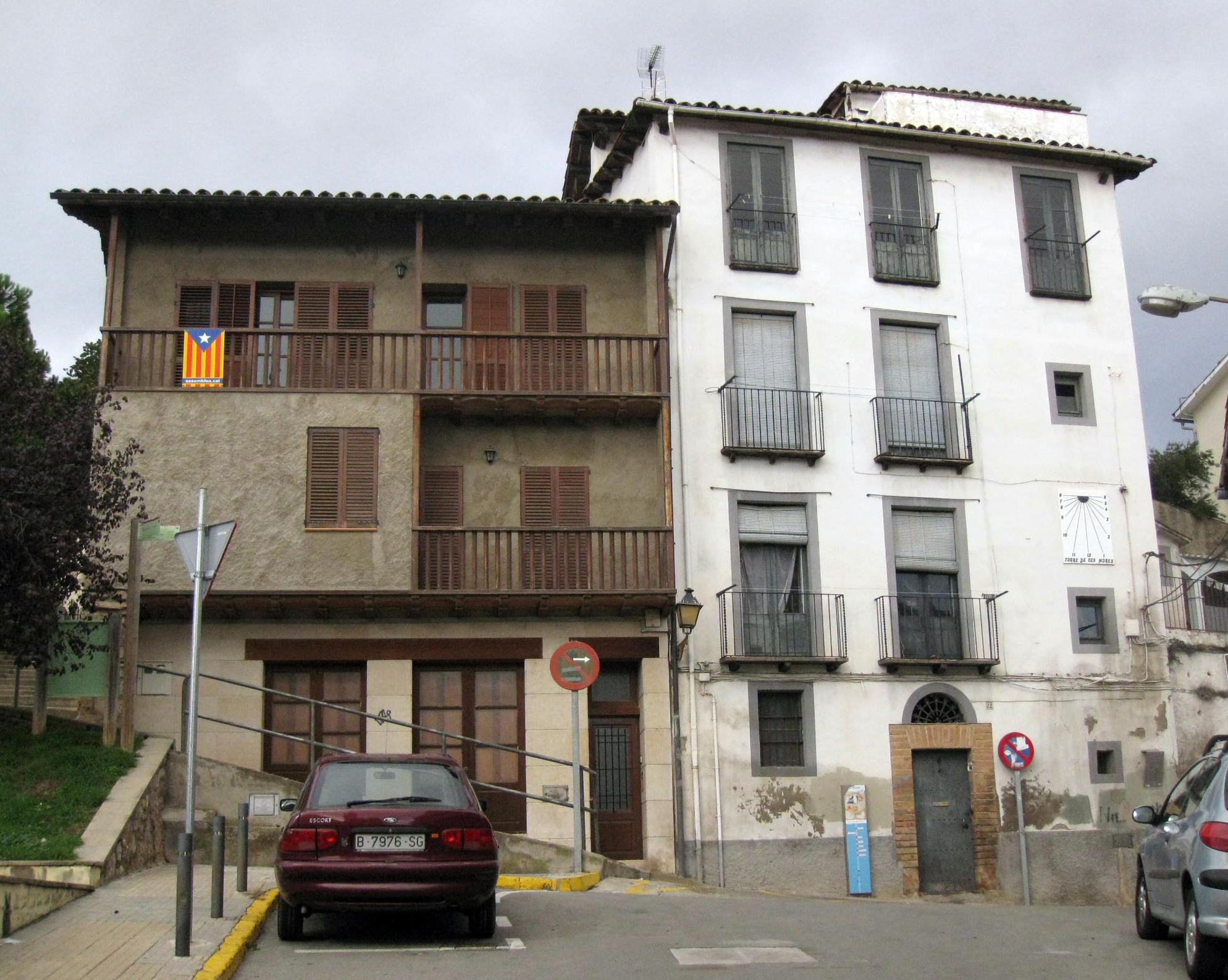 Casa Badia de la Torre de les Hores (Berga) Object location42° 06′ 14.35″ N, 1° 50′ 39.17″ E